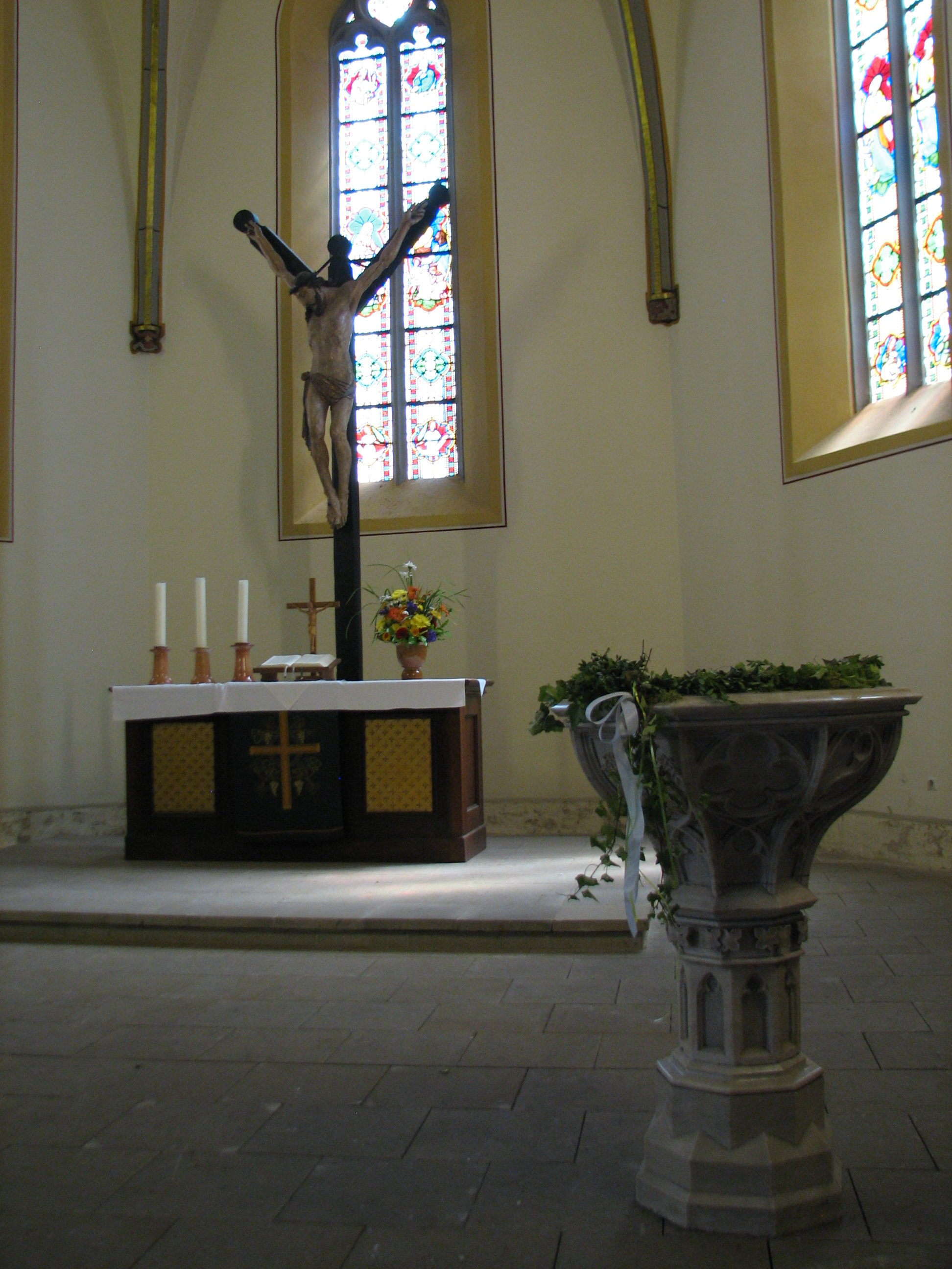 Altar, Kruzifix und Taufstein